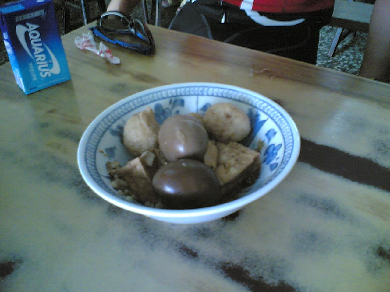 尤其是油豆腐超嫩的,史考特大哥一口氣吃了7個!!而且聽說賣得超好的,一下子就賣完了,想吃的話明天請早!